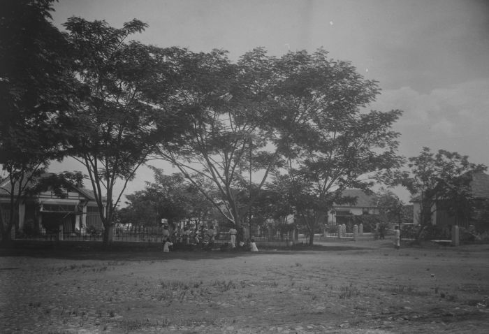 foto. Straatverkopers bij een kruispunt in de wijk Nieuw Gondangdia te Batavia